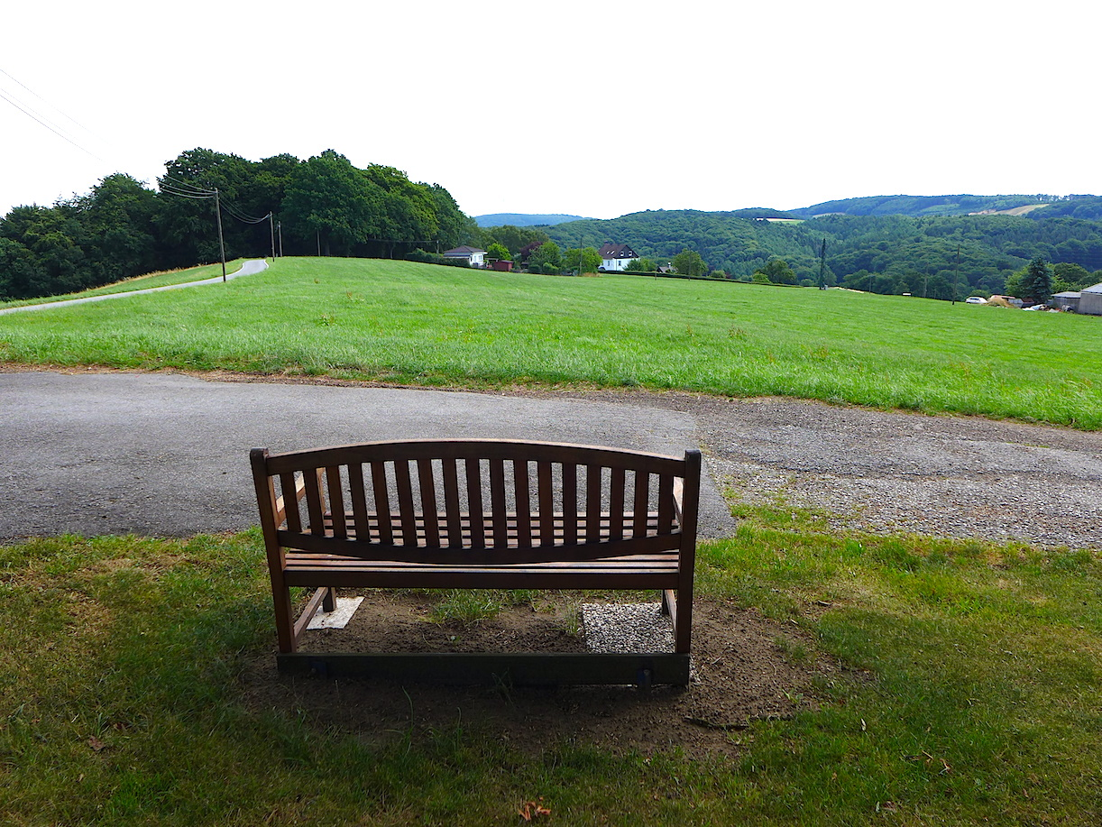 Этап "Нордрат-Ниренхоф" маркированного турмаршрута "Тропа Неандерланд", Северный Рейн-Вестфалия, Германия.